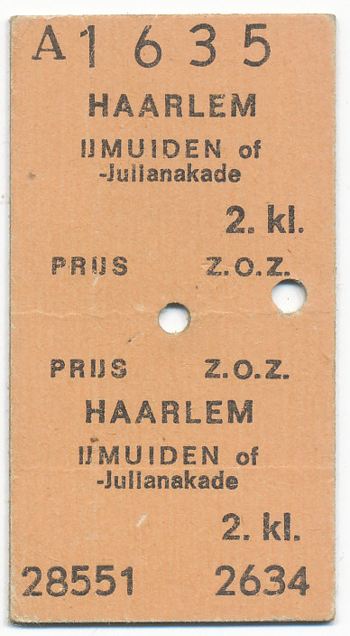 Kartonnen treinkaartje. Van Station Haarlem naar IJmuiden of IJmuiden-Julianakade.